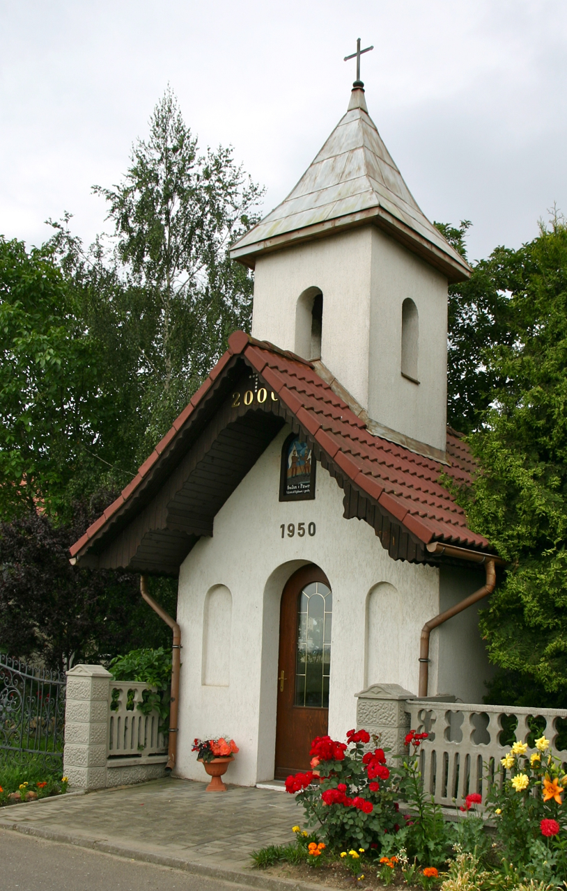 Nowy Dwór Prudnicki (niem. Neuhof) – wieś w Polsce położona w województwie opolskim, w powiecie krapkowickim, w gminie Krapkowice. Object location50° 23′ 47″ N, 17° 53′ 18″ E